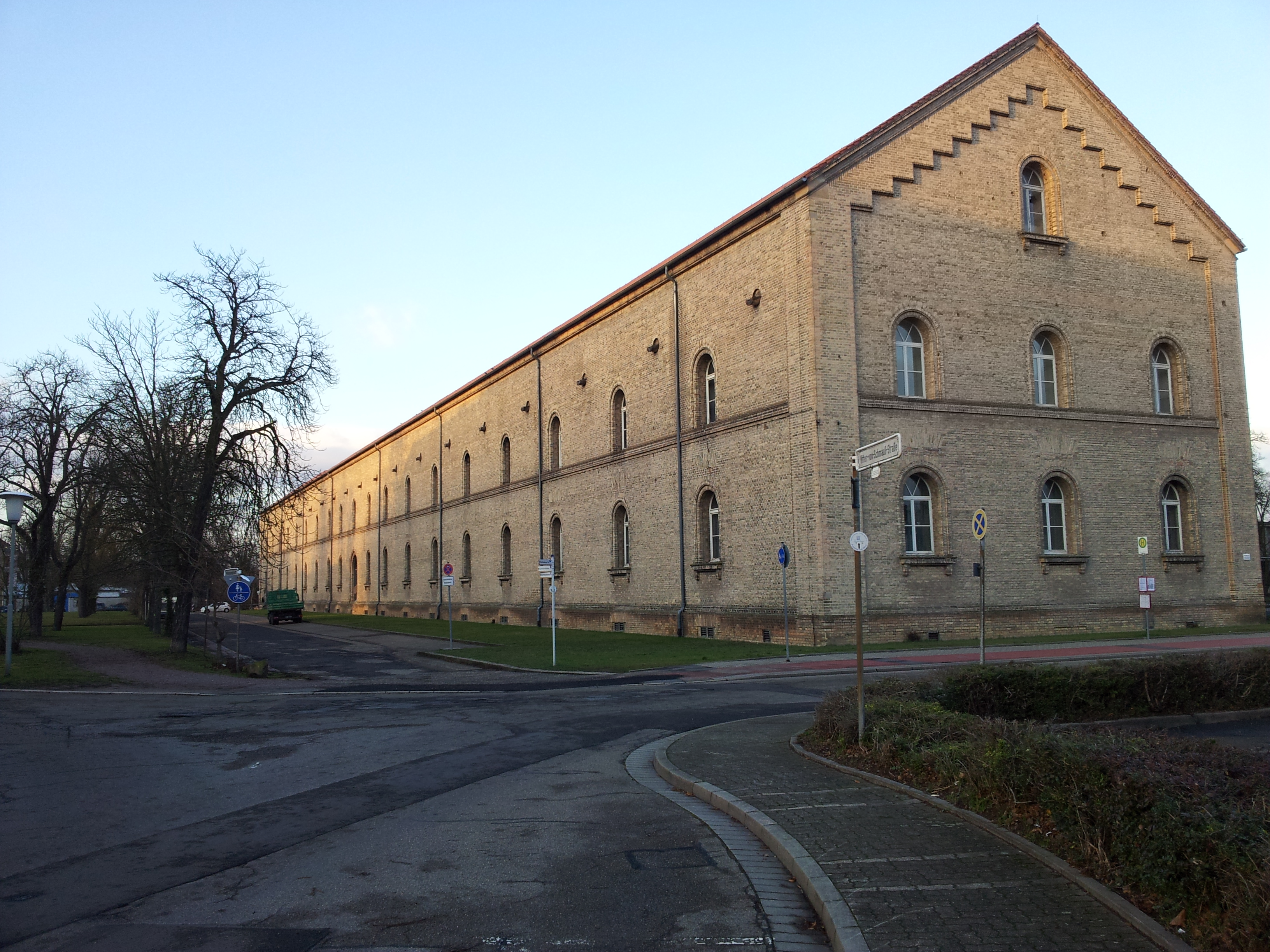 Ehemaliges Lazarettgebäude der Festung Germersheim